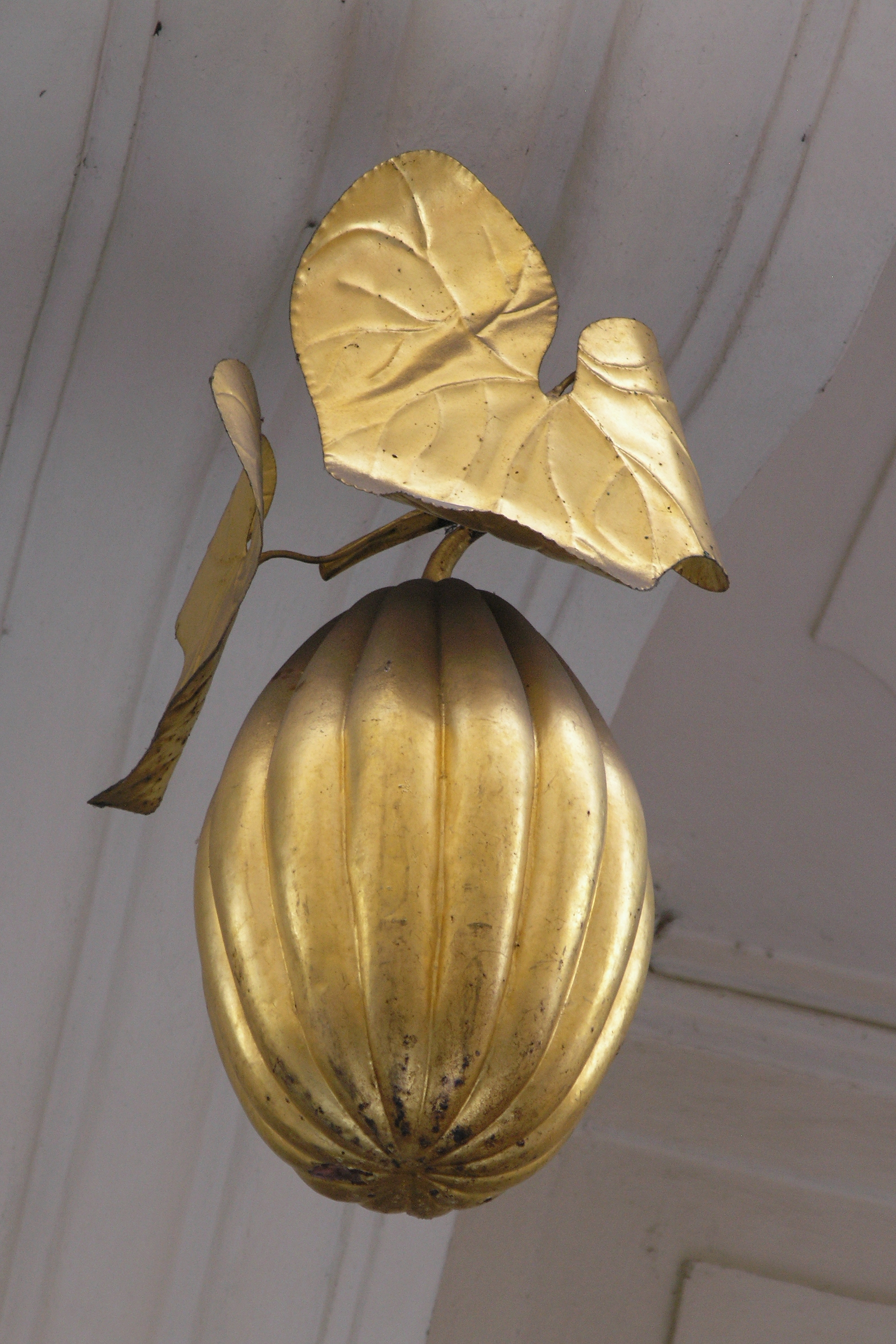 Praha, Staré Město - U zlatého melounu